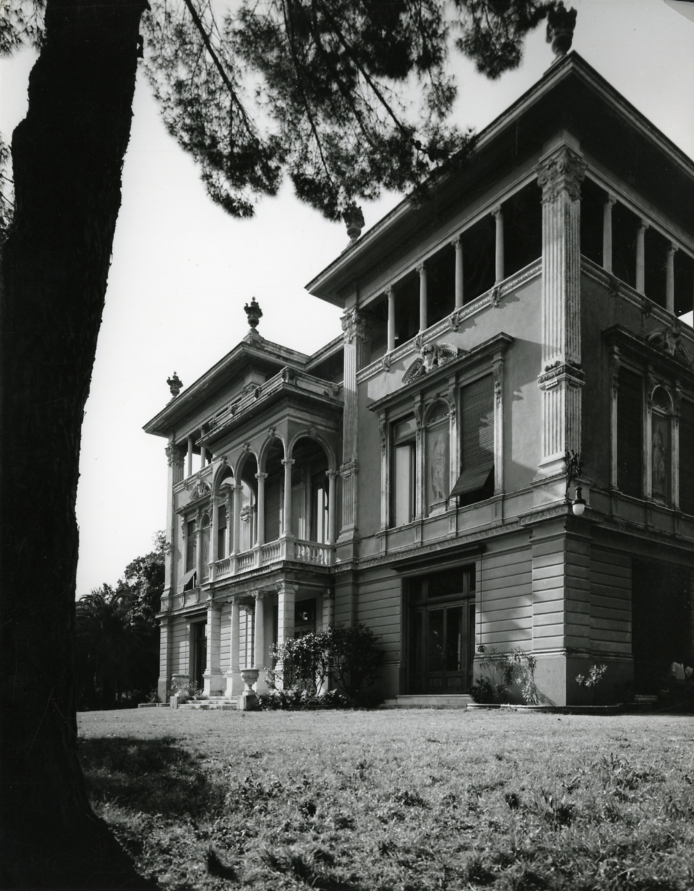 Servizio fotografico : Genova, 1963 / Paolo Monti. - Stampe: 2 : Positivo b/n, gelatina bromuro d'argento/ carta, 24x30. - ((Al verso delle stampe manoscritti i numeri dei negativi corrispondenti: 6609, 6612, e altra numerazione interna alla serie?: 38, 39; iscrizioni didascaliche manoscritte a matita, e timbro a inchiostro con copyright: "© - Credit to:/ Paolo Monti/ Via T. Tasso [...]/ Milano [...]". - Sul coperchio della scatola iscrizione didascalica manoscritta a pennarello nero: "Genova e Liguria/ Città storiche". - Sull'agenda denominata "R 1 - Monti/ 1 aprile 1963 - 6 giugno 1964/ 6000-8193", in corrispondenza dell'indicazione della suddetta serie appunto manoscritto: "Villa con torre e cavalcavia sulla Crosa a Quarto". - Il negativo identificato con il numero 46397 è stato realizzato per Zodiac. - Occasione: Documentazione per la pubblicazione: Italia Nostra (a cura di), "Le ville genovesi", catalogo della mostra, Genova 1962, Genova, Comune di Genova, 1967. - Fonte: Monografia di Italia Nostra (a cura di): Le ville genovesi, catalogo della mostra, Genova 1962, Genova, Comune di Genova (1967). - Fonte: Lettera di Paolo Monti: I. Carteggi/ Genova - Enrico (1963-1966), presso Archivio Paolo Monti. Camicia con documenti dattiloscritti e manoscritti vari relativi al lavoro eseguito per Italia Nostra: preventivi, lettere, inventari. - Fonte: Rubrica di Paolo Monti: Archivio fino 1-4-1961/ 31-3-1963 (1961-1963), presso Archivio Paolo Monti. - Fonte: Agenda di Paolo Monti: R 1 - Monti/ 1 aprile 1963 - 6 giugno 1964/ 6000-8193 (1963-1964), presso Archivio Paolo Monti